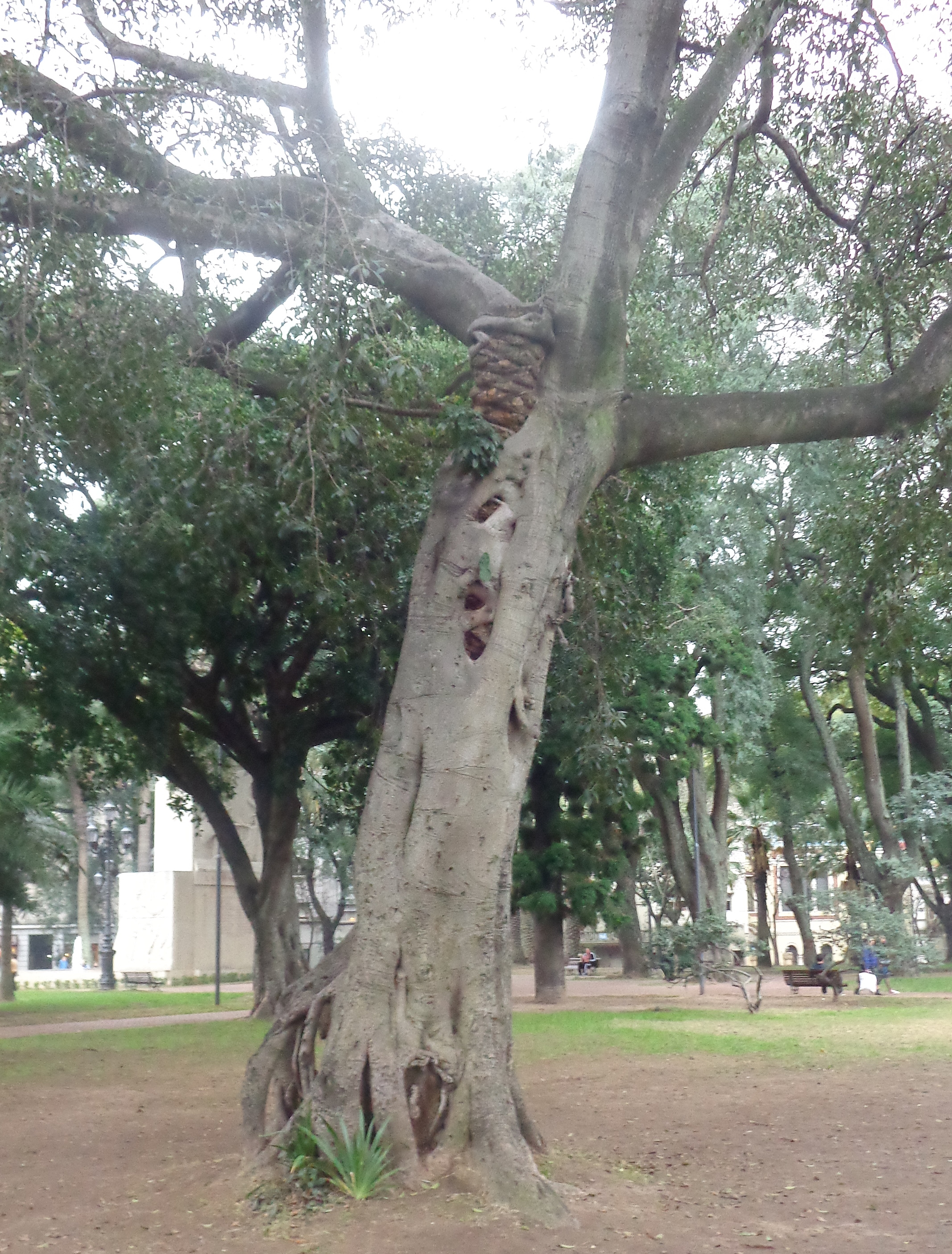 Ficus luschnathiana o Ibapoy en Parque Lezama, Monserrat, Buenos Aires, Argentina. Encierra a una palmera.